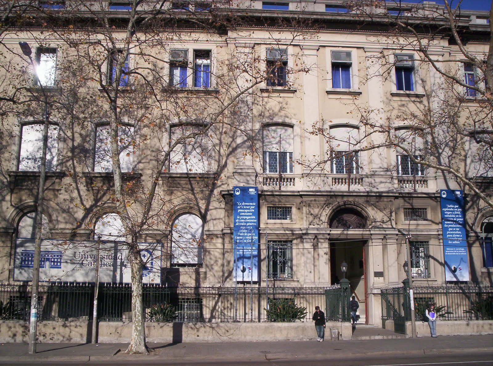 Universidad Católica del Uruguay Dámaso Antonio Larrañaga